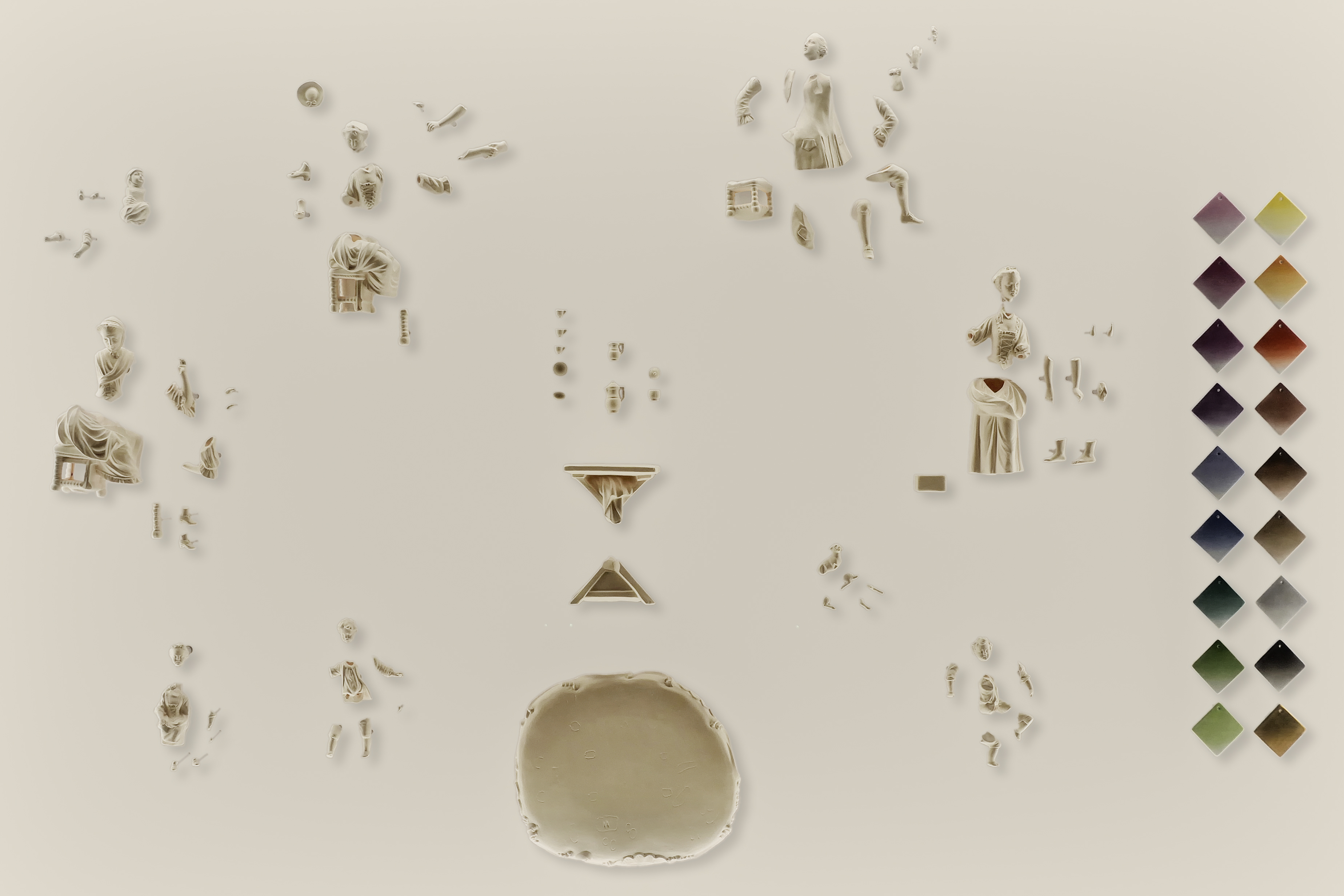 Die 84 Einzelteile der Porzellanfigur "Kaffeegesellschaft" von Jean Jacques Desoches